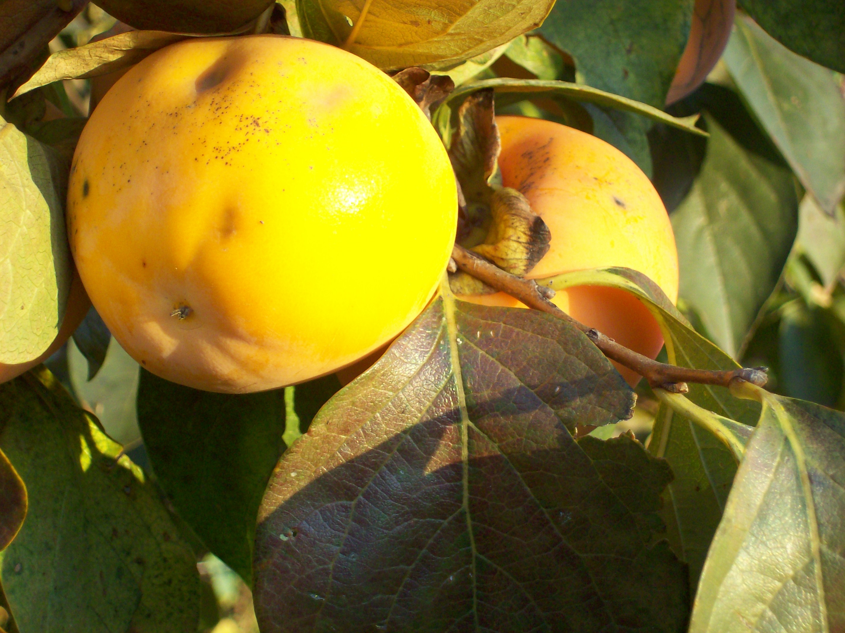 Caco ancora sull'albero (Diospyros kaki)